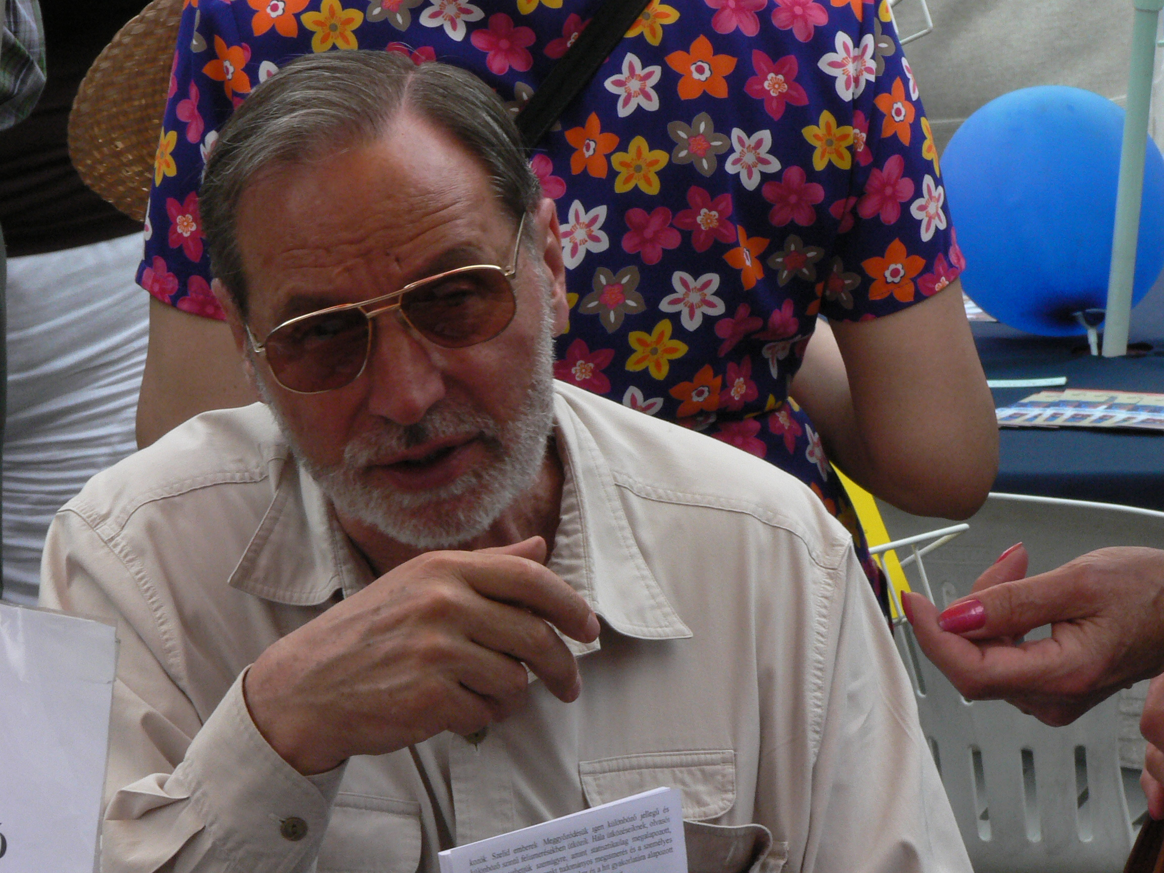 Bitó László dedikál a 78. Ünnepi Könyvhéten 2007. június 3-án a budapesti Vörösmarty téren. A fénykép megjelent Creative Commons alatt a Metapolisz DVD sorozatban.